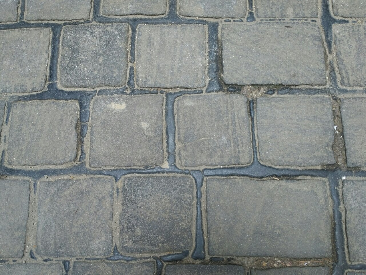 Az eredeti fakocka-burkolat hiányzó darabjait helyettesítő kőkockák az Unger-ház átjárójában.